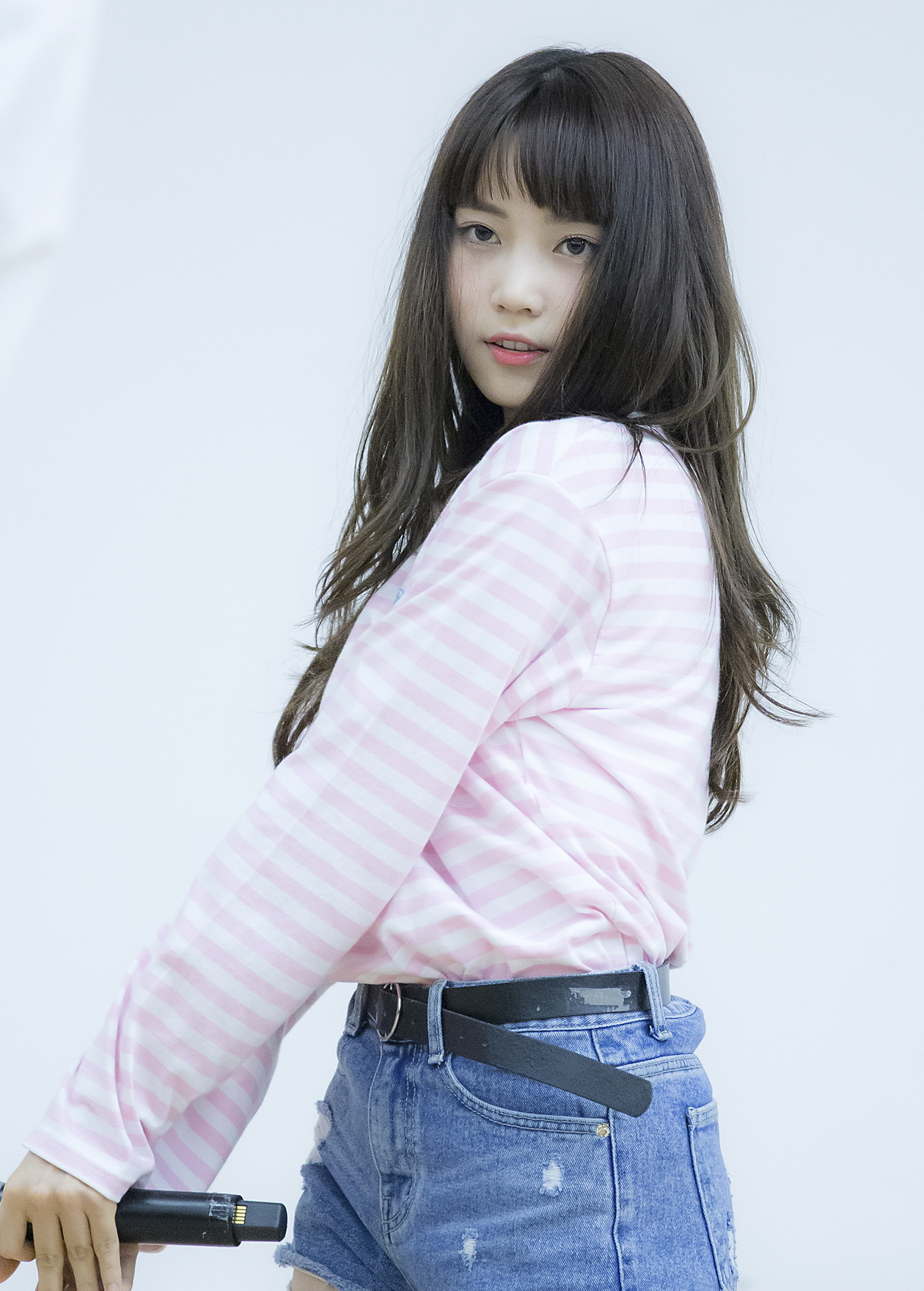 170914 다이아 2주년